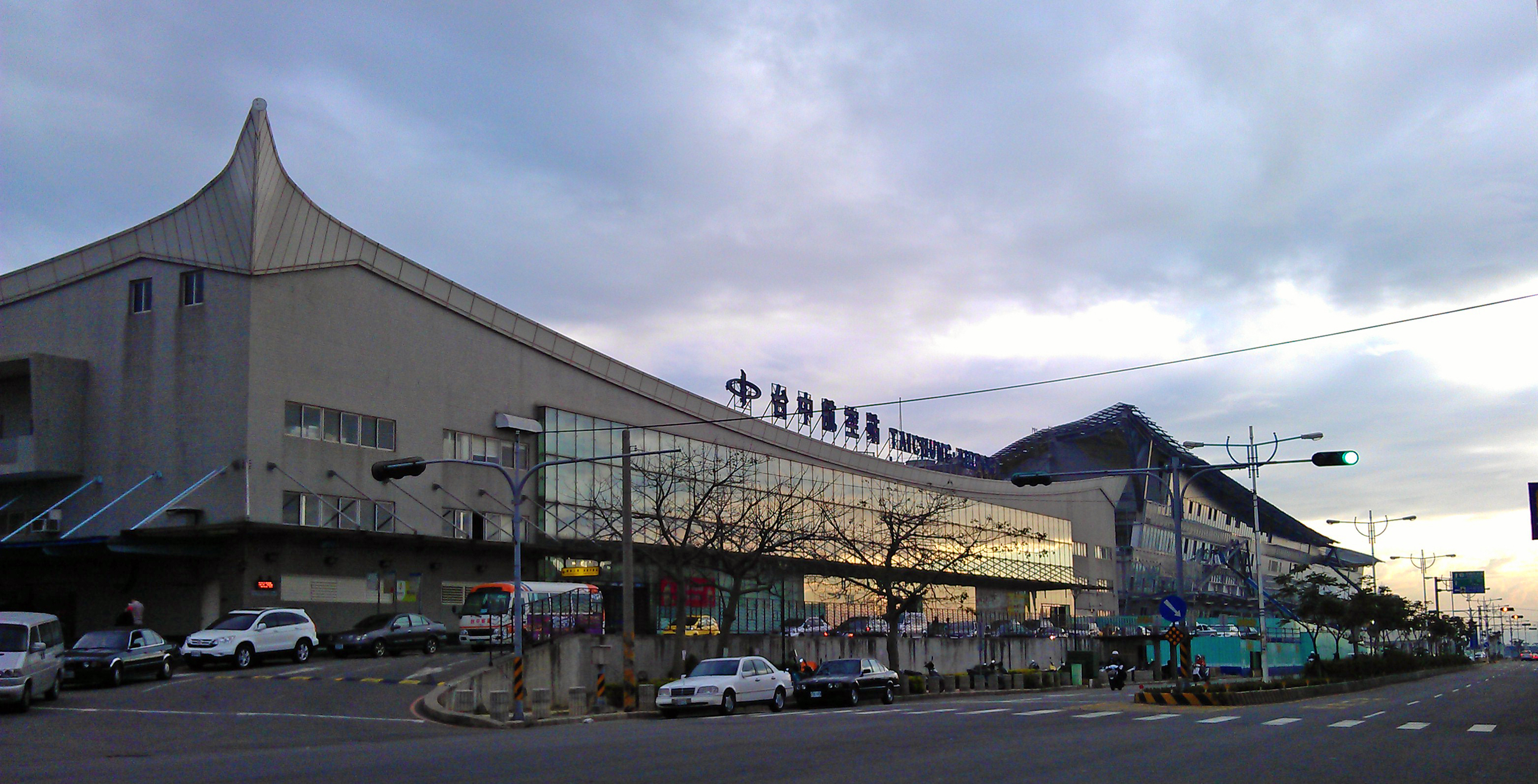 左側為台中航空站，右側為興建的中部國際機場國際航廈